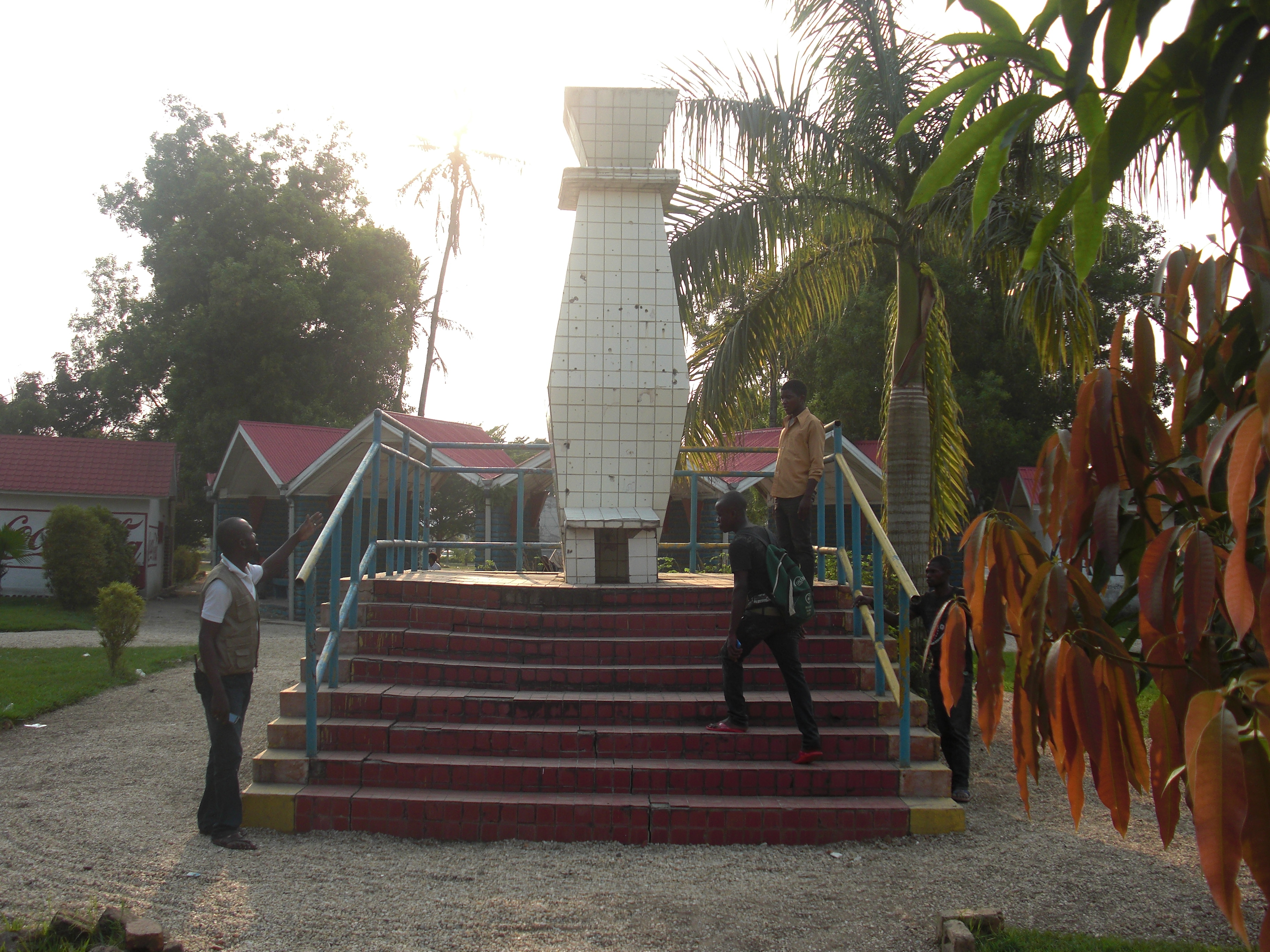 LEGENDE : Kisangani, ex Province Orientale, RD Congo : des habitants visitent la place du 4 janvier qui rappelle la mémoire des martyrs de l’indépendance. Photo MONUSCO/André Kitenge